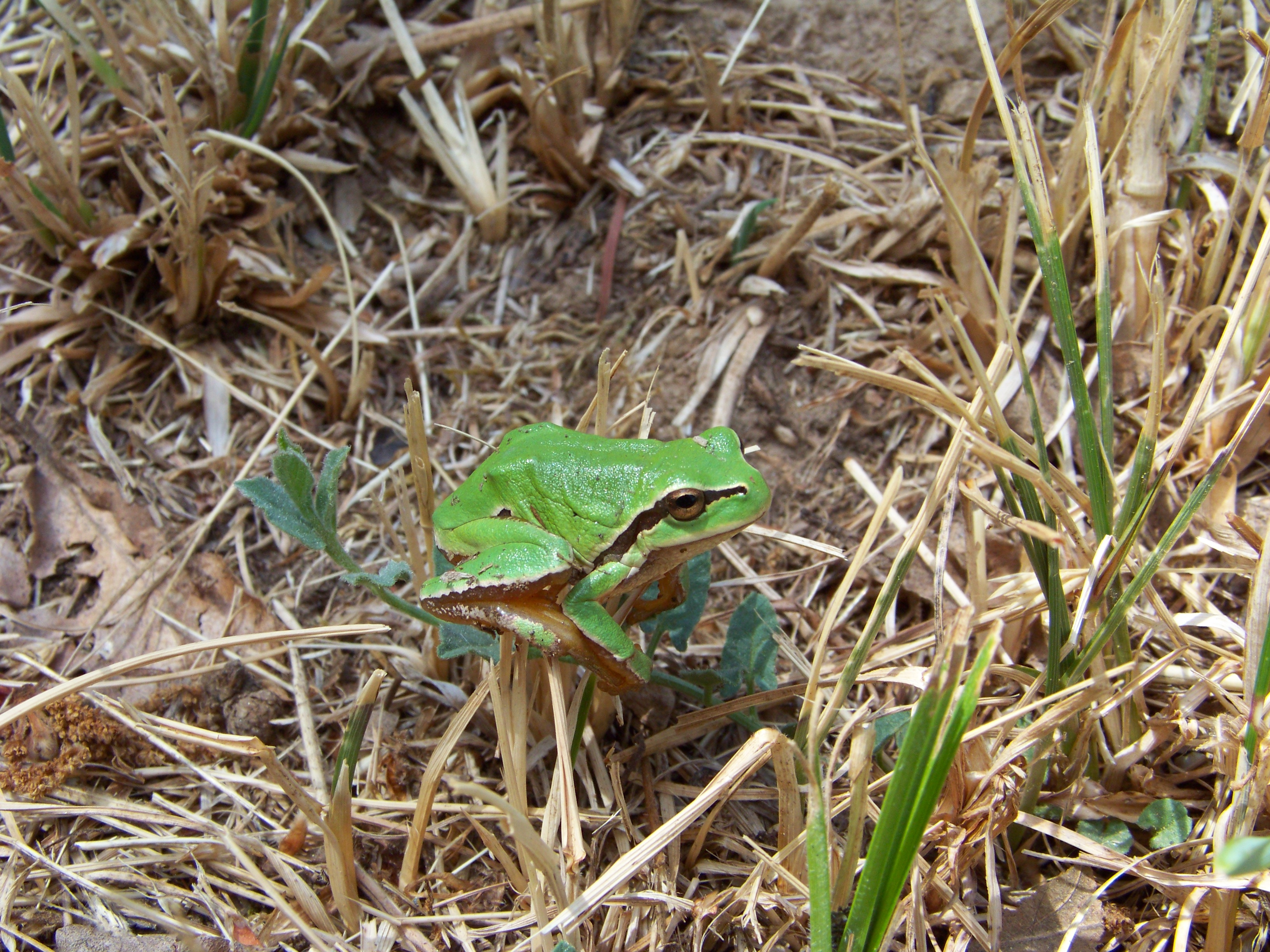 Lago de Sanabria y alrededores. This is a photography of a Special Area of Conservation in Spain with the ID: ES4190105. Natura2000 entry, EEA entry